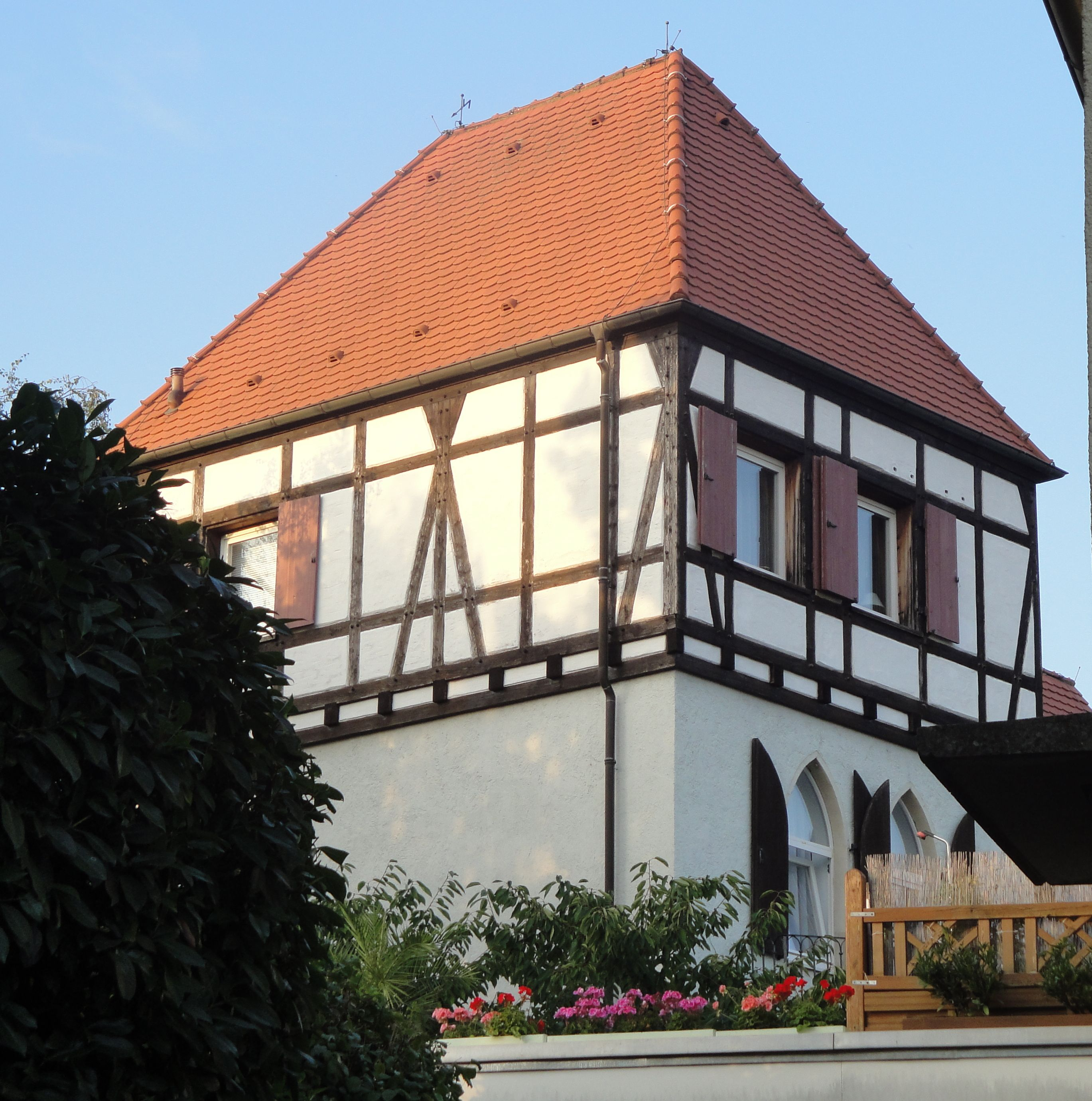 Schmiedeturm in Speyer